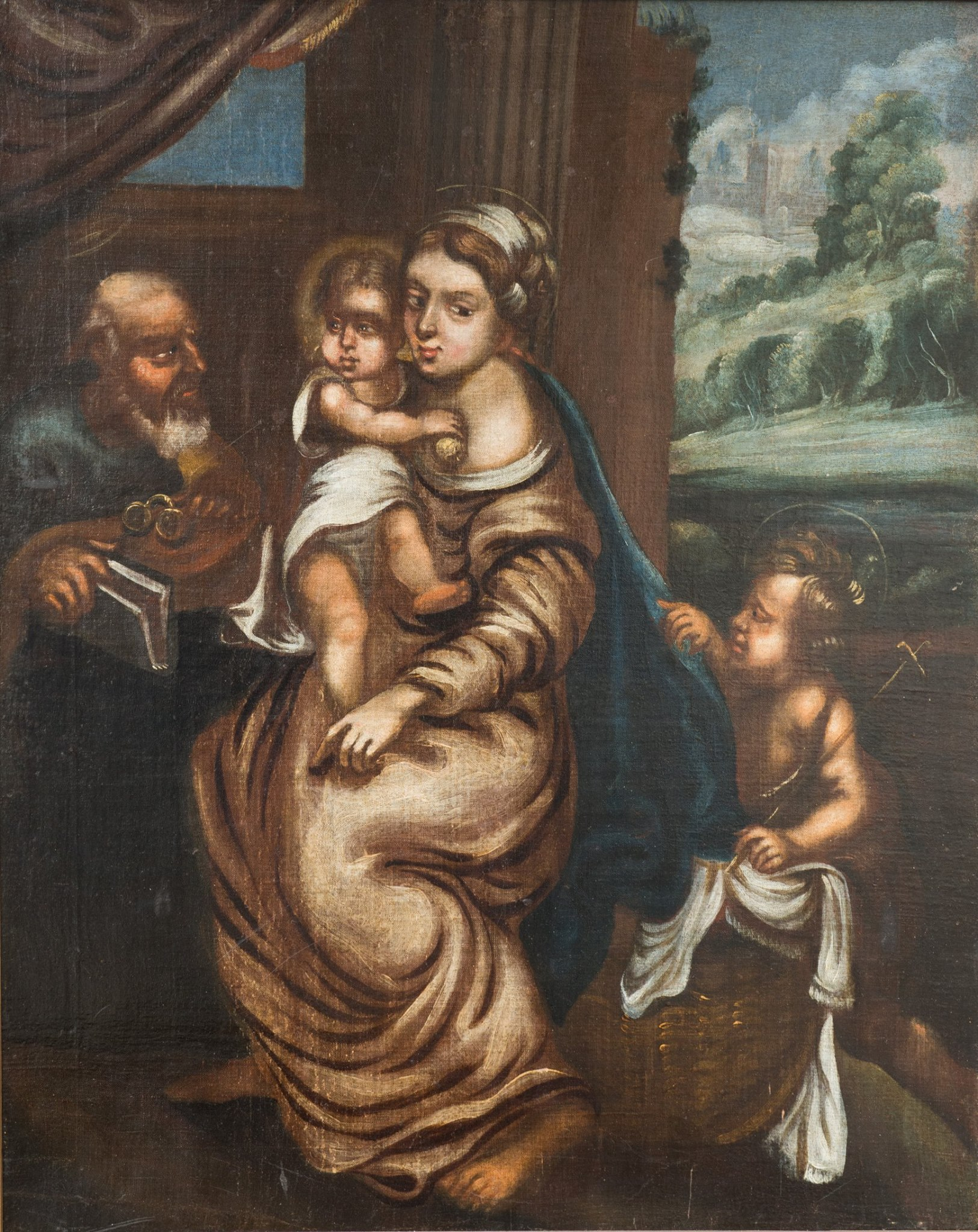 Святая Сям’я з Янам Хрысціцелем. Абраз, XVIII ст. Палатно. Алей. Музей гісторыі рэлігіі, Гродна. Паходзіць з уніяцкай царквы в. Коматава Гродзенскага раёна. На абразе можна ўбачыць элементы мясцовага сялянскага побыту: ля ног Марыі плецены з лазы сасуд (шыян), кінуты на яго ручнік, маленькі Ісус трымае анучу з цёртым макам. Сялянкі давалі яе немаўлятам замест соскі, калі бралі дзіця з сабой у поле. У руках Святога Язэпа акуляры, якія былі вынайдзены праз 13 стагоддзяў пасля нараджэння Хрыста, і кніга - кодэкс, якая таксама з'явілася пазней. Павярхоўны назіральнік можа ўбачыць у гэтых дэталях недасведчанасць жывапісца, няведанне ім рэалій біблейскага часу. Але можа, наадварот, ананімны мастак куды лепш разумеў прыроду сакральнага, чым навуковец. Падзеі Свяшчэннай гісторыі – архетыпічны. Яны мінулі, і, у той жа час, парадаксальным чынам быццам аднаўляюцца у рытуале (Крыжовая Дарога на Страсную Нядзелю, Тайная Вячэра ў Еўхарыстыі і г.д.) і паўсядзённым жыцці. Так і архетып Святой Сям'і ў большай ці меншай меры адлюстроўваецца ва ўсіх хрысціянскіх сем'ях, Можа, таму невядомы жывапісец і ўбачыў нешта ад Дзевы Марыі у сялянскай жанчыне, якая песціла свайго сына. Побытавыя рэаліі 18 ст. яшчэ раз падкрэсліваюць вечнасць сюжэту і яго актуальнасць.